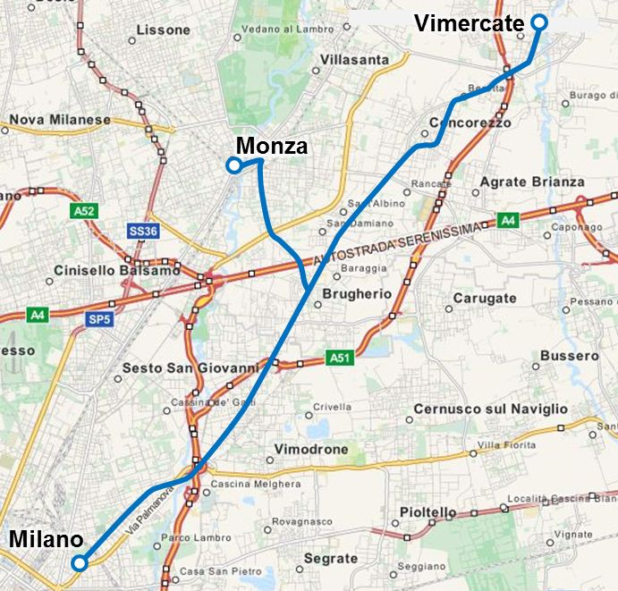 Tranvia Milano-Vimercate